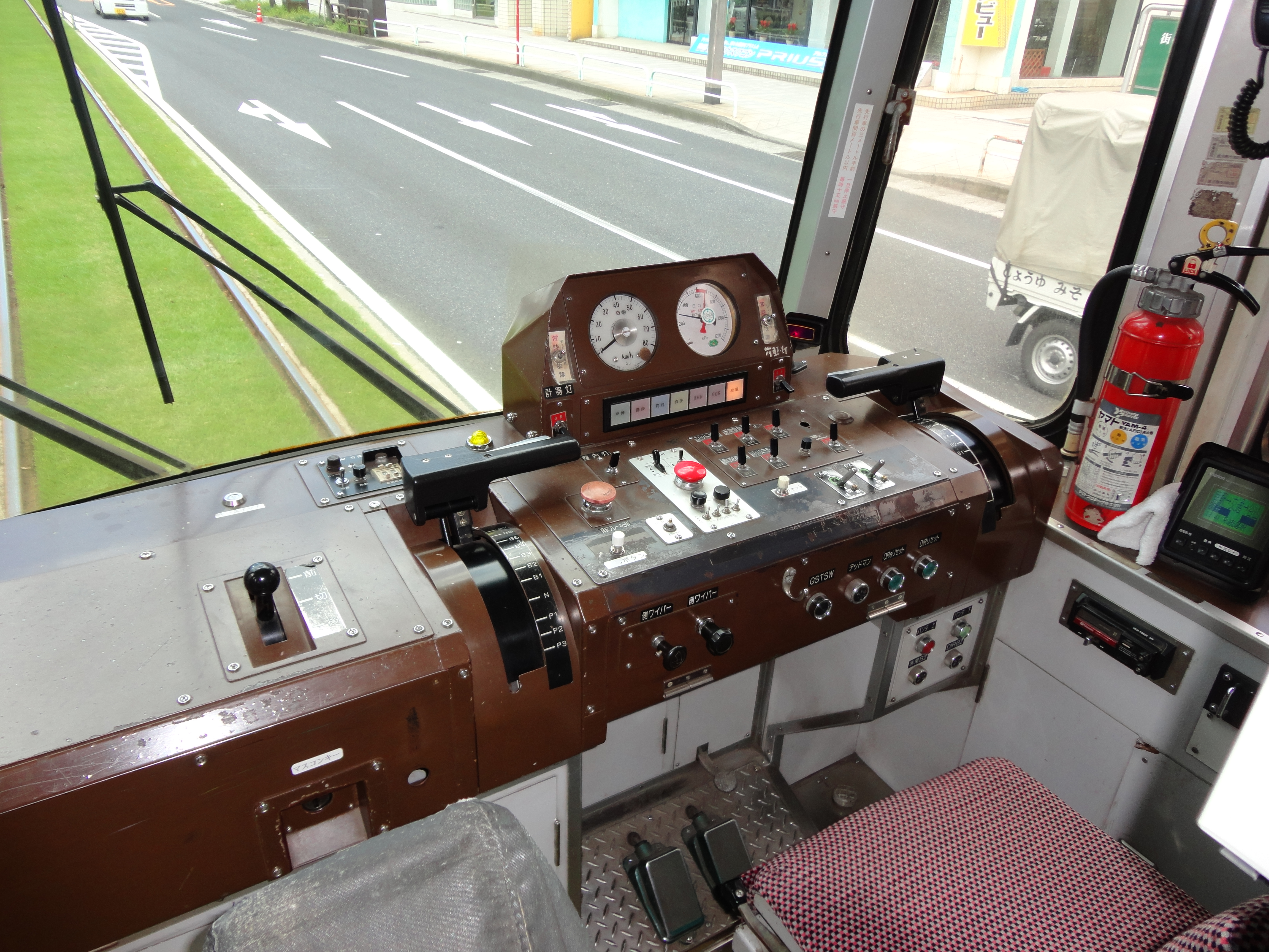 鹿児島市交通局2120形運転台